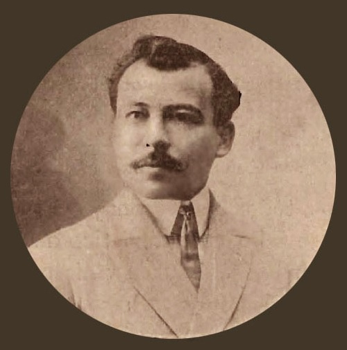 El escultor costarricense Juan Ramón Bonilla en 1909.